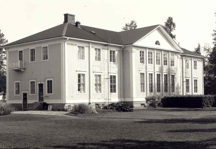 Lappfjärds folkhögskola i Kristinestads kommun i Österbotten i Finland, sommaren 1990.